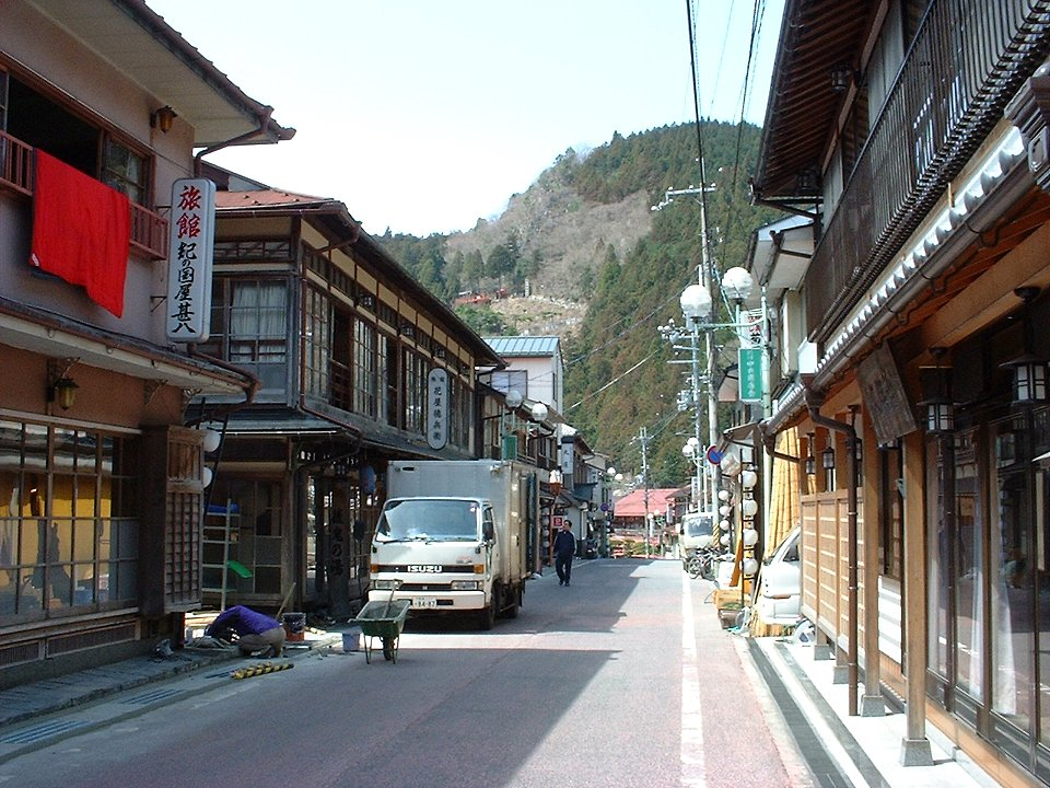 洞川温泉の旅館街